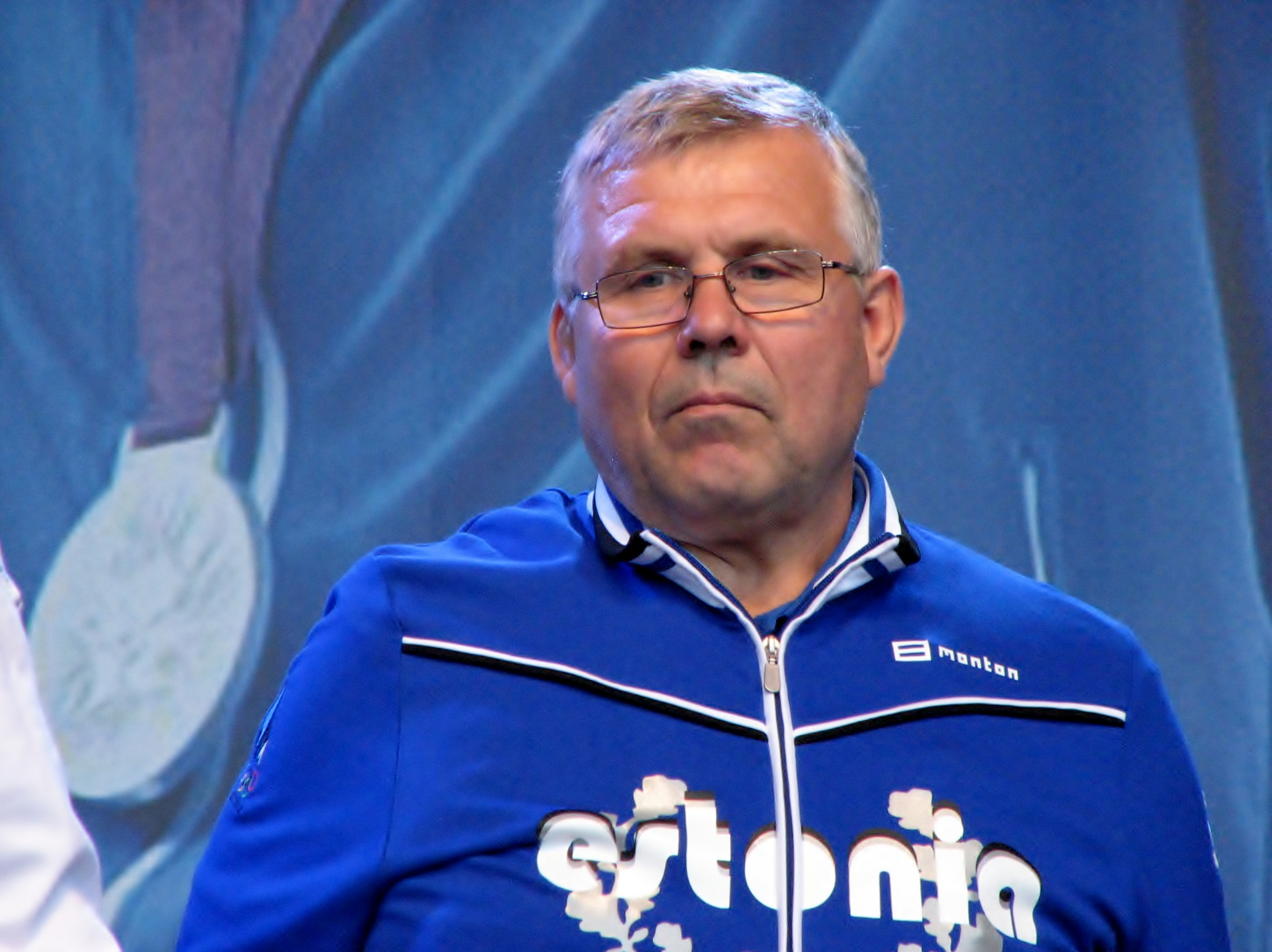 Henn Põlluste Vabaduse väljakul olümpiamedalistide tervituspeol